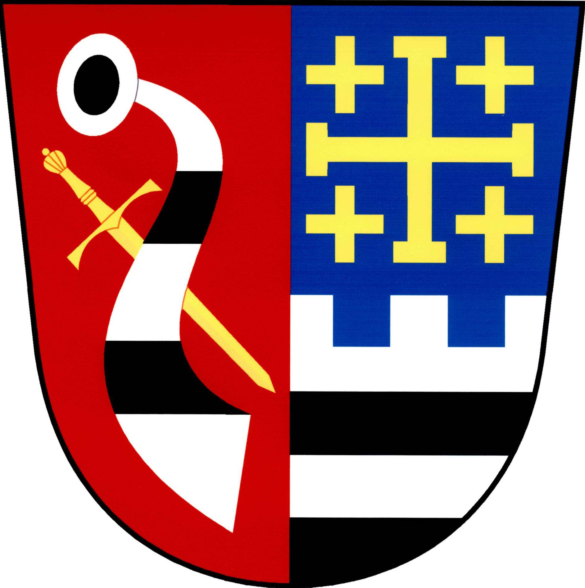 Znak obce Prusinovice